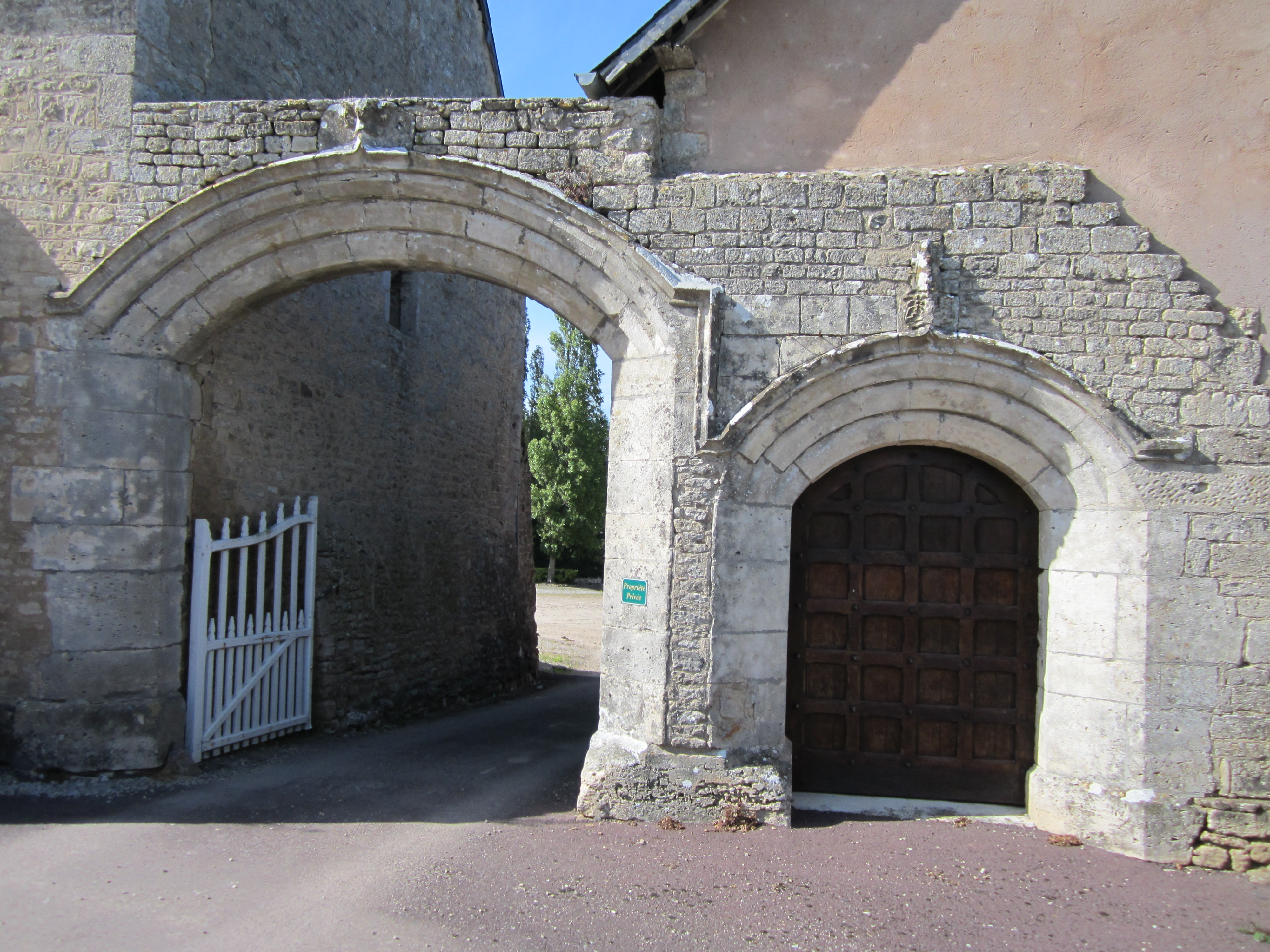 Manoir d'Urville-Bocage, Manche .